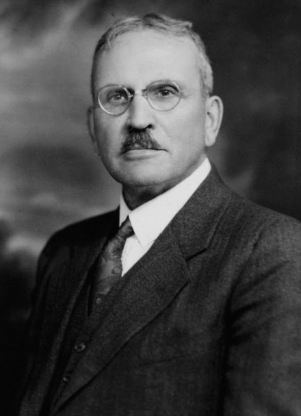 Joseph-Ferdinand Daniel, parlementaire